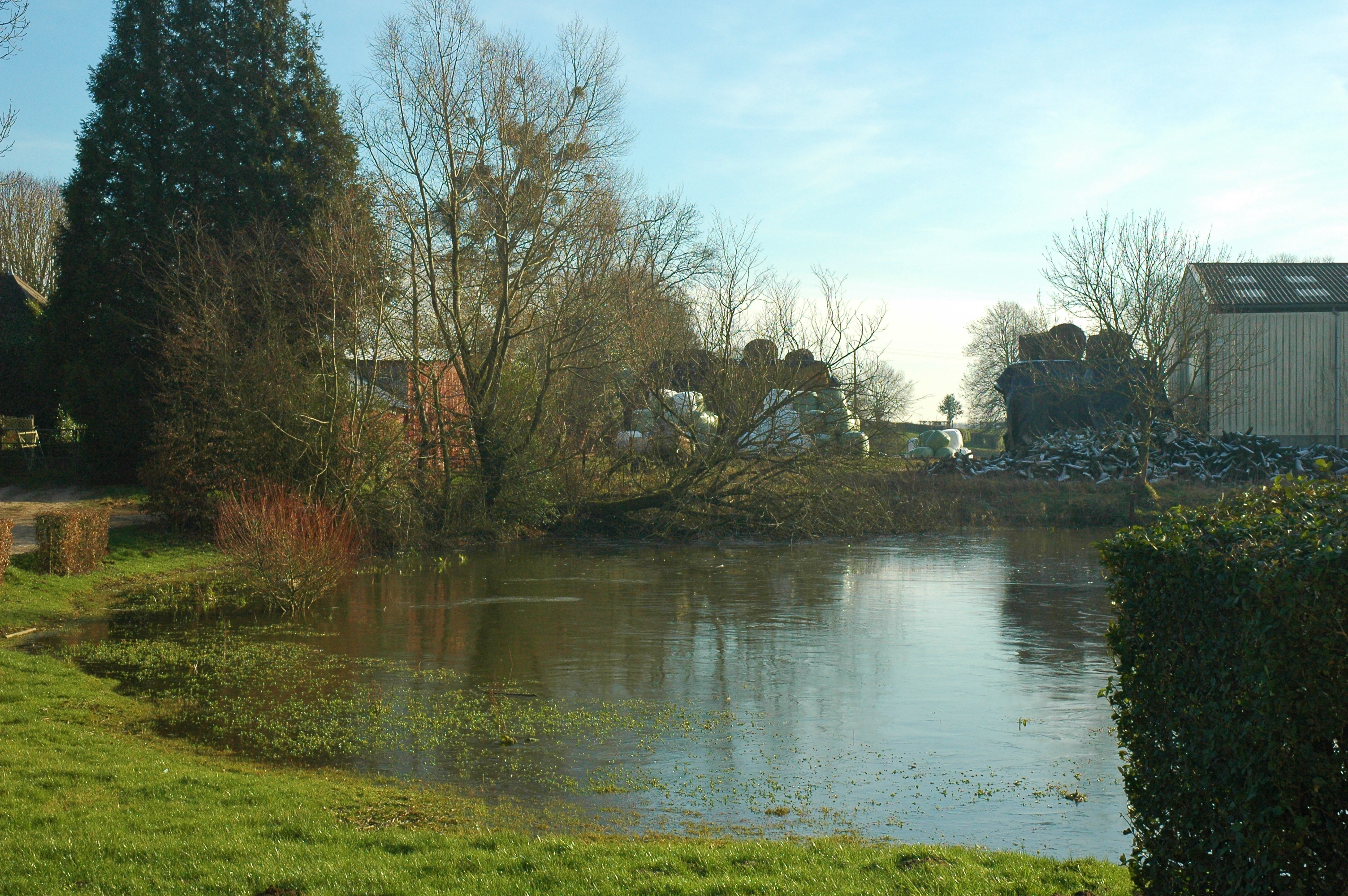 Saint-Pierre-des-Jonquières (Seine-Maritime, France). La mare.